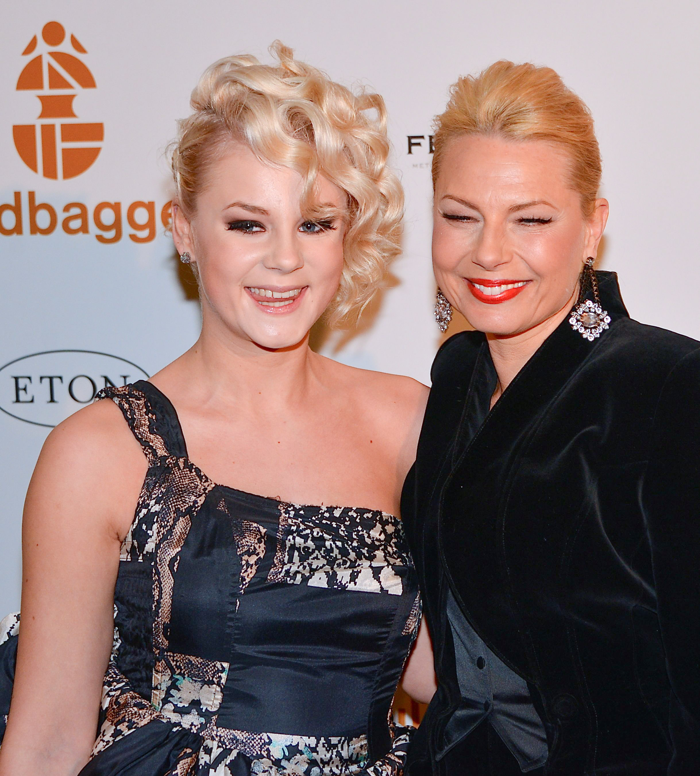 Molly Nutley & Helena Bergström på på Guldbaggegalan 2013 den 21 januari 2013.